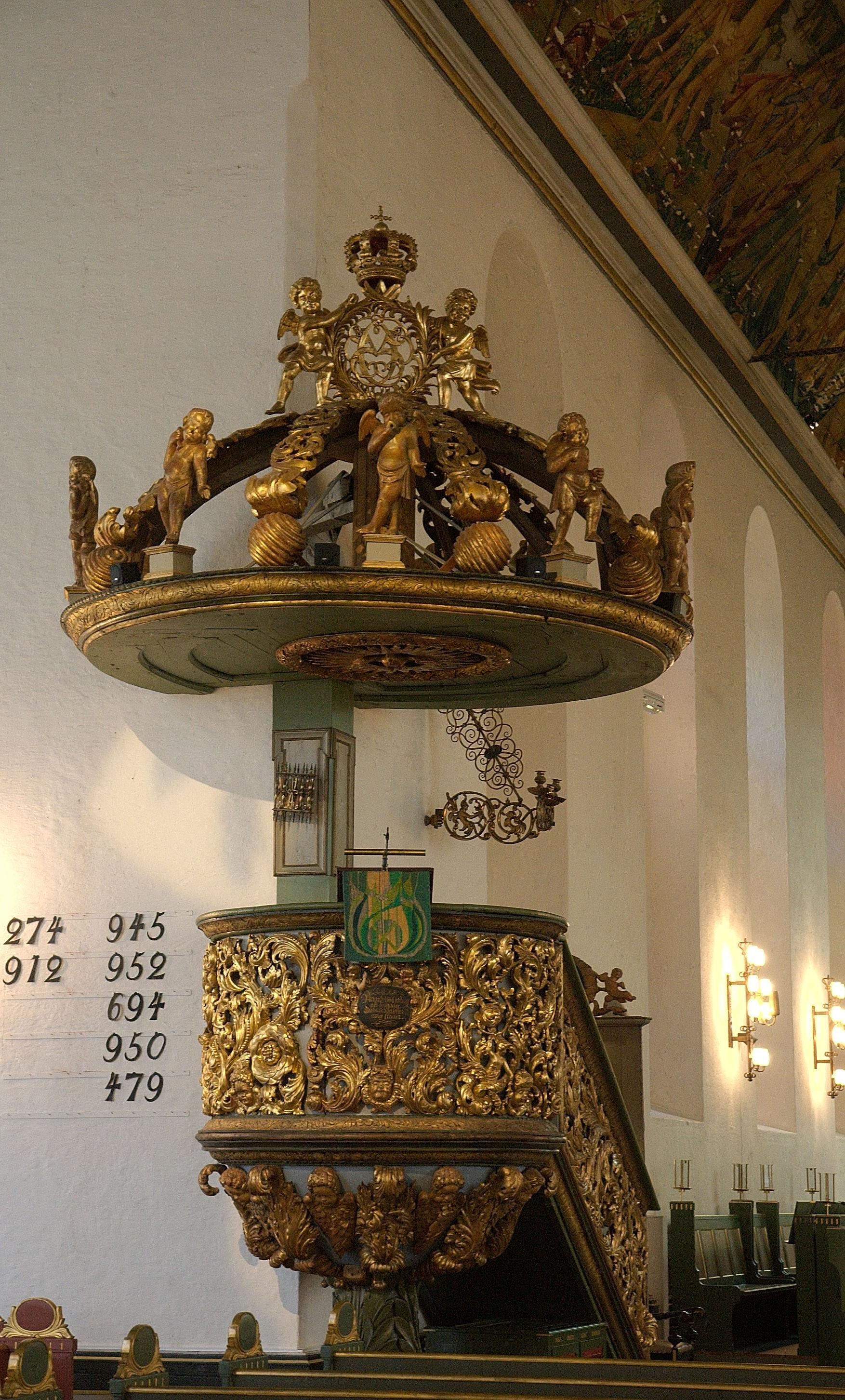 Prekestolen i Oslo Domkirke